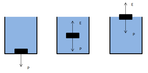 Hiru kasuak